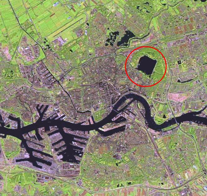 Gebaseerd op nl::Afbeelding:Rotterdam 4.45392E 51.91454N.jpg NL Rotterdam categorie:Lucht-satelietfoto Rotterdam